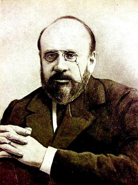 Русский композитор и литератор Сергей Львович Толстой (1863-1947)